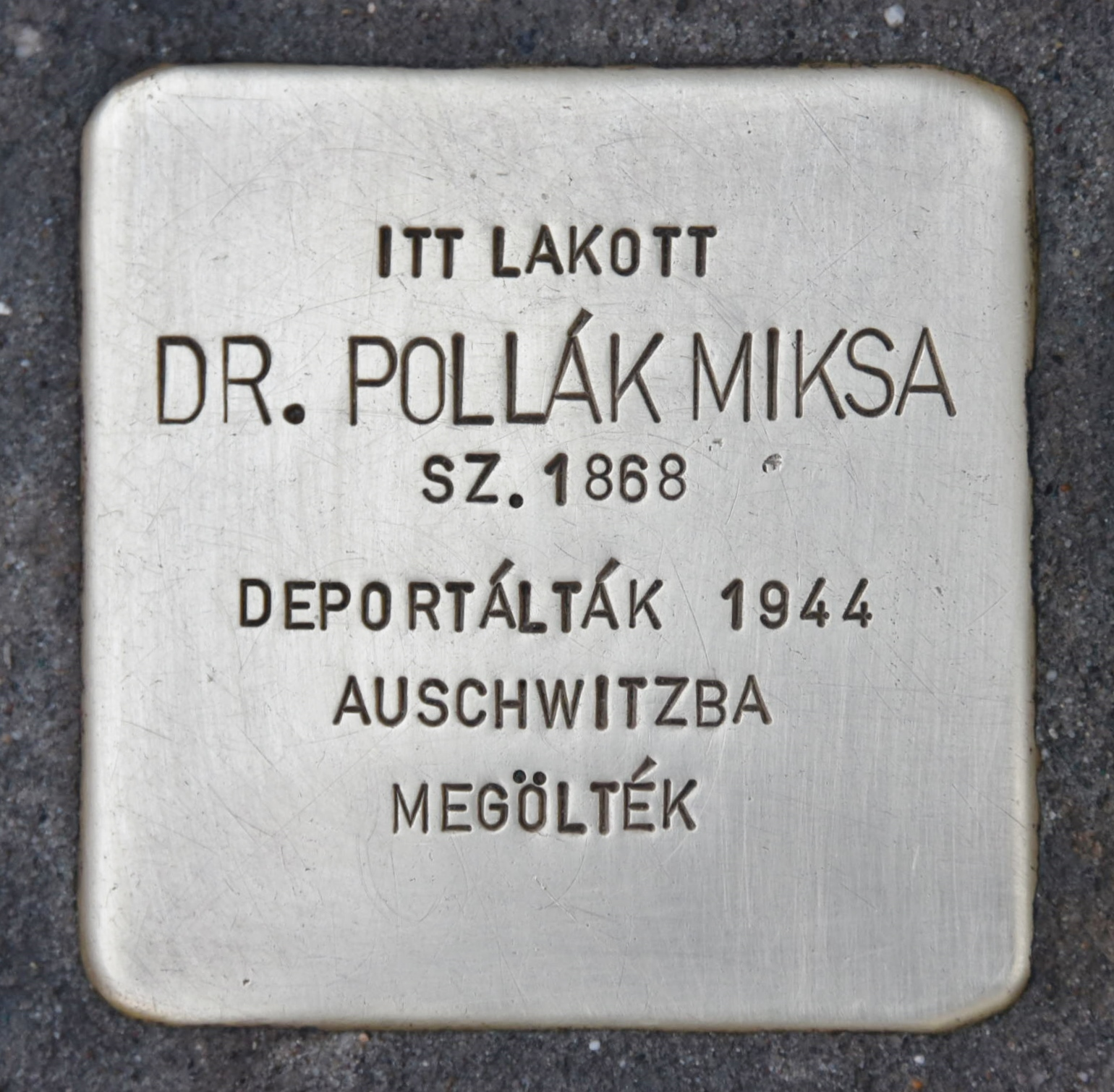 Stolperstein für Dr. Miksa Pollak